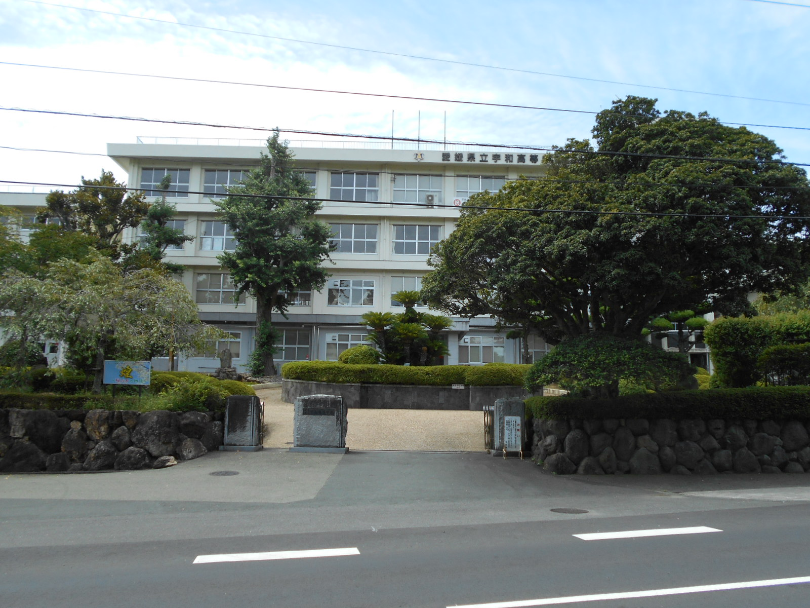 愛媛県立宇和高等学校